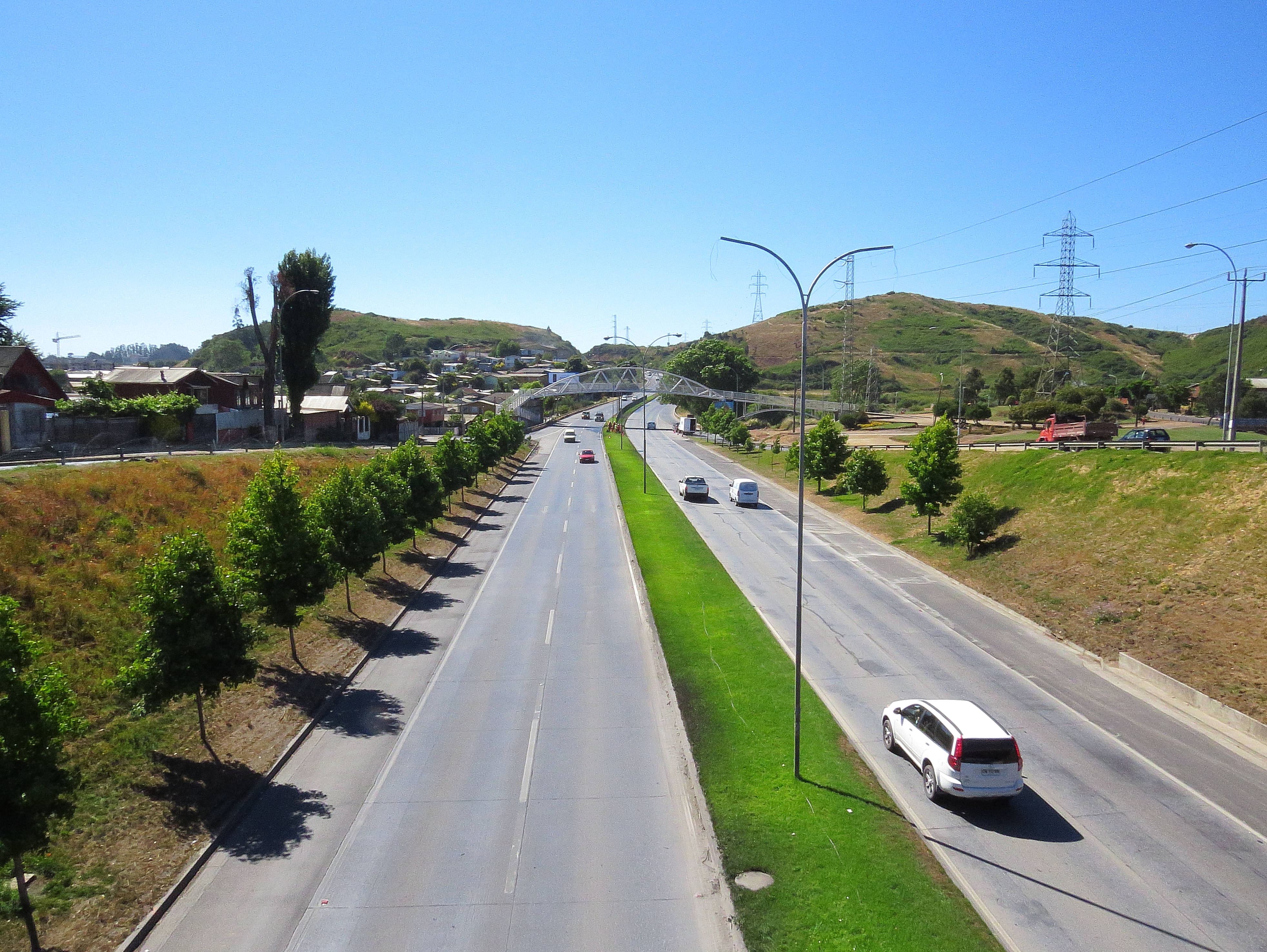 Autopista Bonilla Alonso de Ribera en la VIII Región del Biobío, Chile.